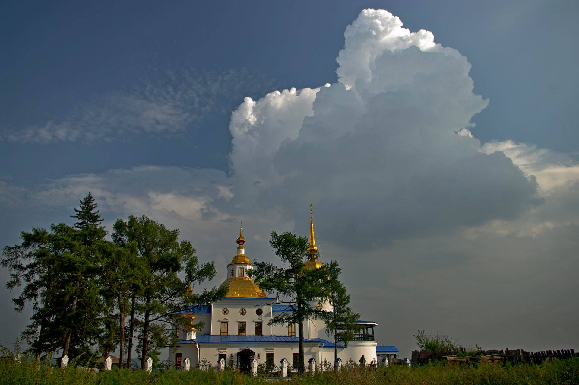 Казанская церковь, связанная с пребыванием на поселении декабристов: улица Муханова, 9, Усть-Куда, Иркутский район, Иркутская область